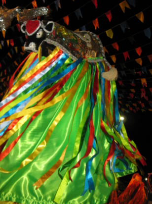 Apresentação do Bumba-meu-boi Mimoso no São Luís Shopping em 26 de junho de 2011.